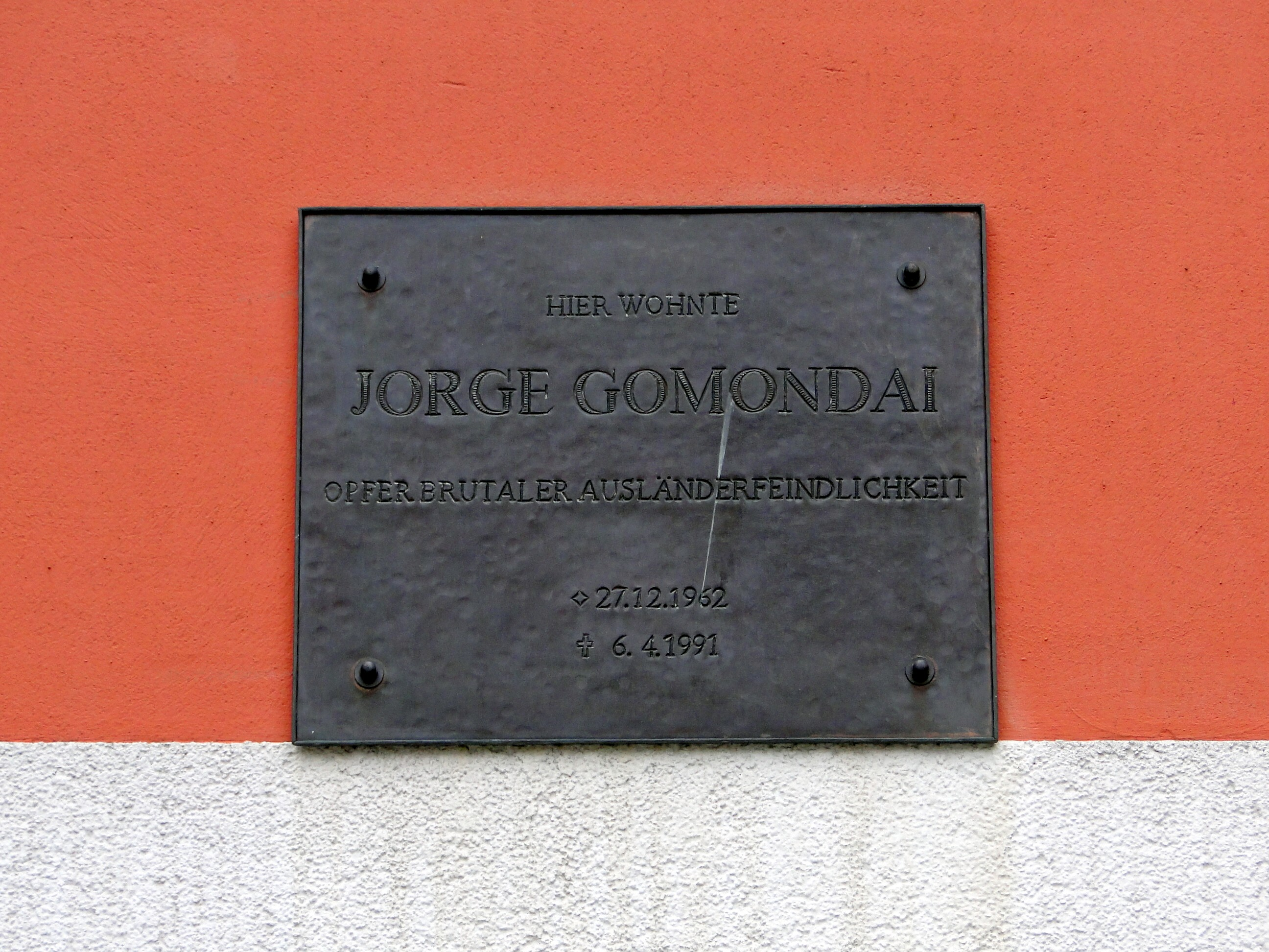 Gedenkplakette am letzten Wohnhaus Jorge Gomondais, Holbeinstraße 42, Dresden